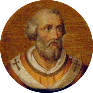 Medaillon von IOANNES XII in St. Paul vor den Mauern